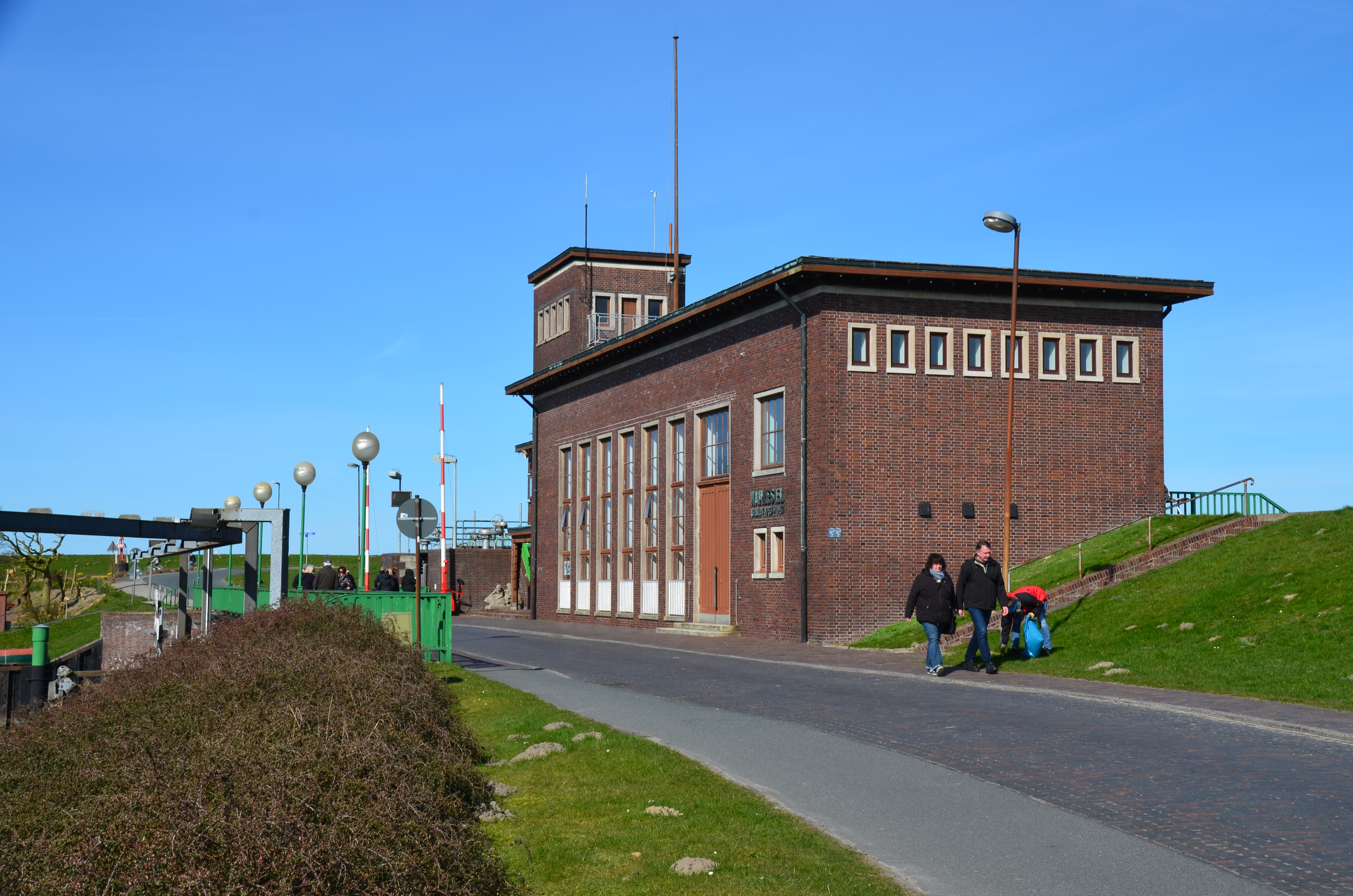 Das Schöpfwerk Harlesiel, Binnendeichsseite